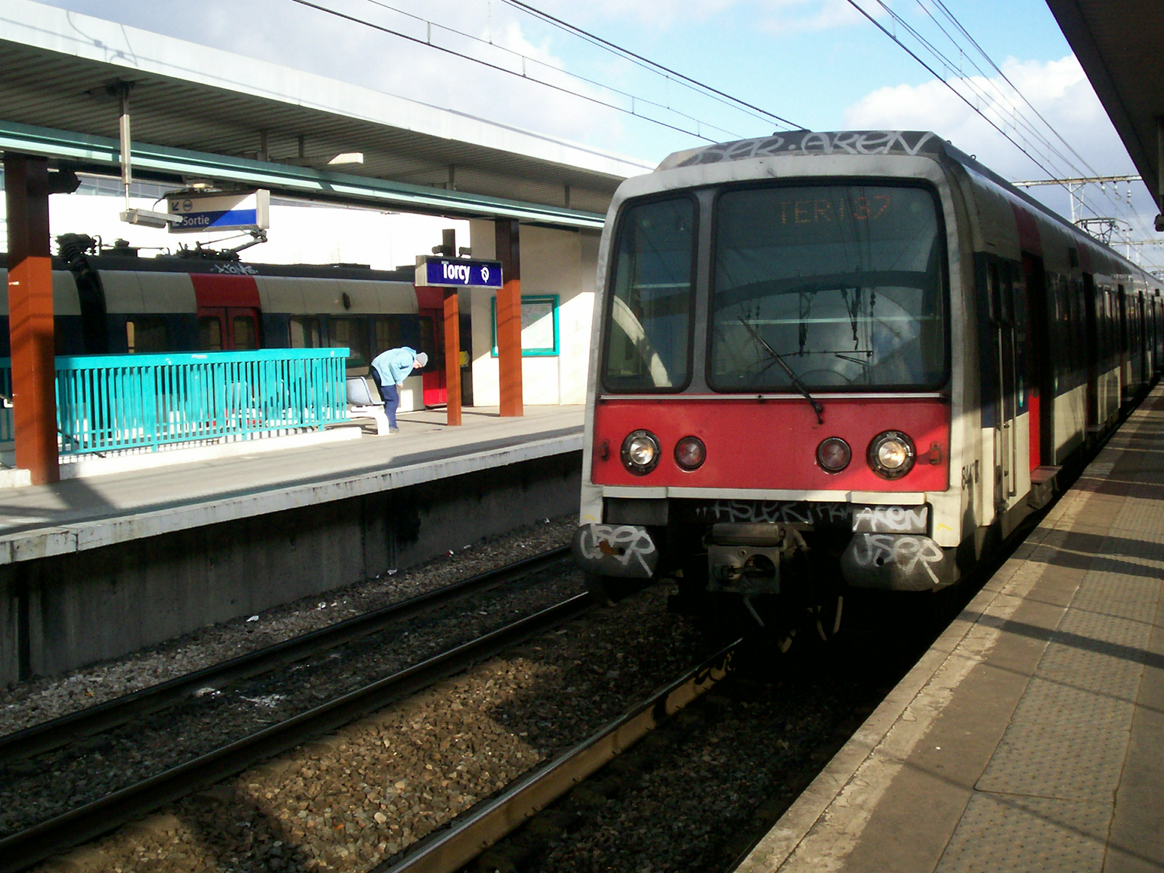 MI 84 - Gare de Torcy